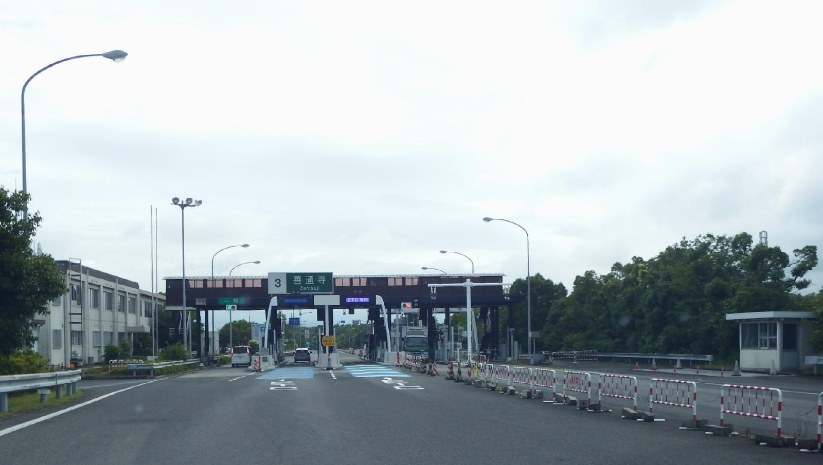 善通寺インターチェンジの降り口